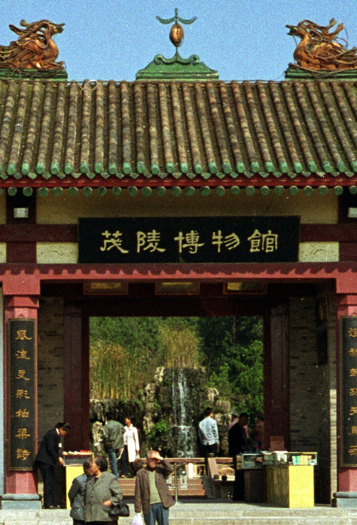 茂陵博物馆额匾